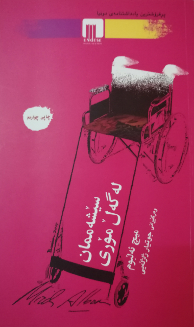 کوردیی ناوەندی: به‌رگی ڕۆمانی سێشه‌ممان له‌گه‌ڵ مۆری